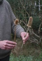 Dau fath o grib y paniwr, y math gwyllt (chwith) a’r math ar ffurf petrual i gribo gwlan